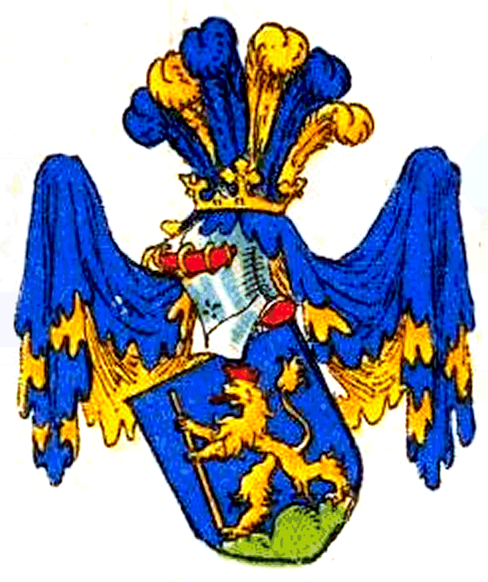 Wappen derer von Stengel